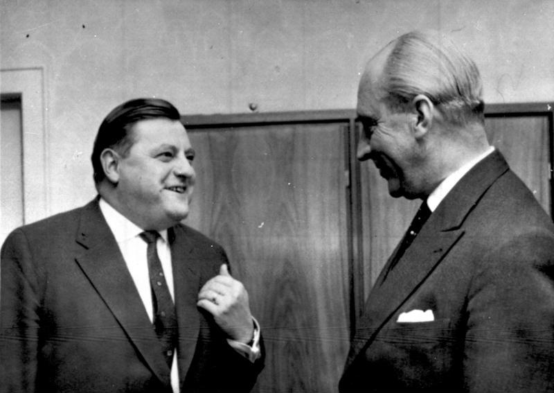 Zentralbild-AP 22.5.1959 Der Wehrbeauftrage des Deutschen Bundestages... Helmut von Grolman (rechts) im Gespäch mit Kriegsminister Franz Josef Strauß (links) während eines Höflichkeitsbesuches am 9. April 1959.